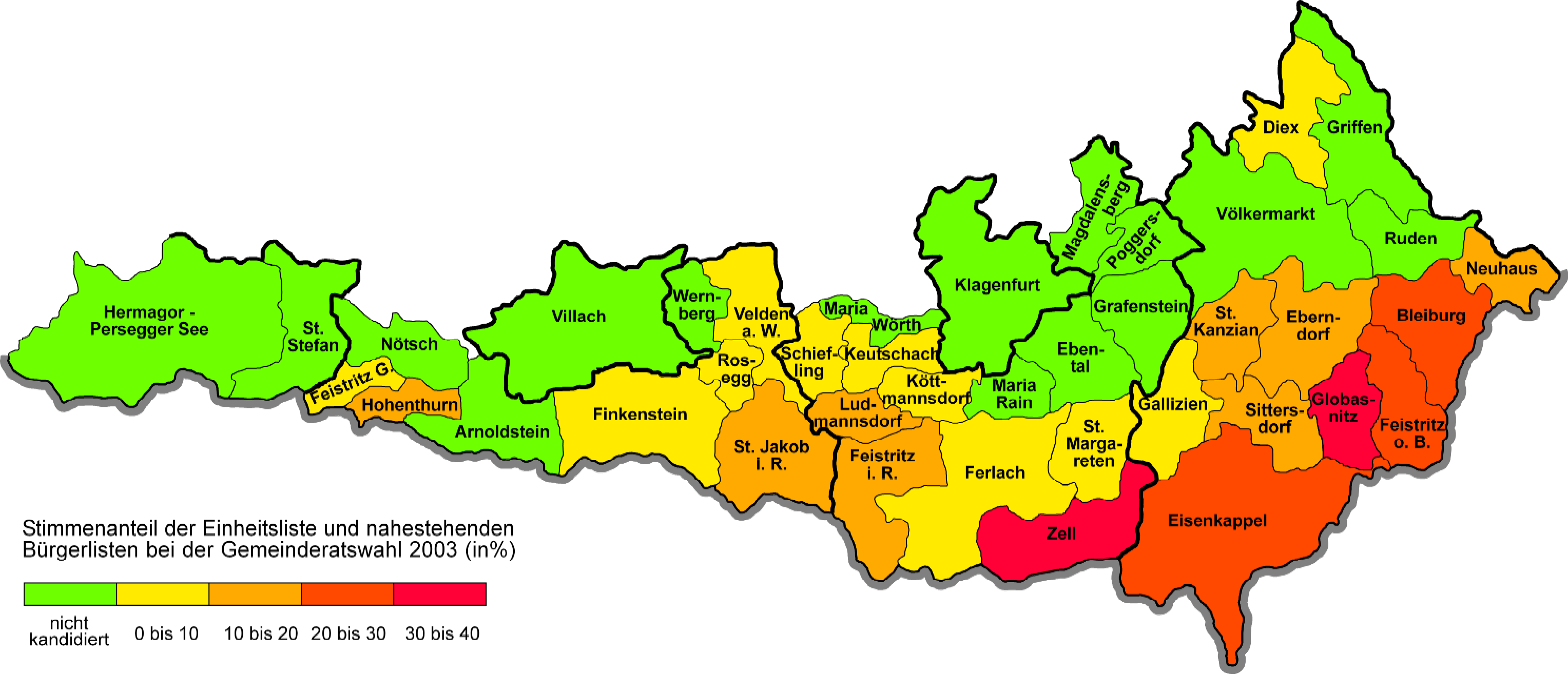 Anteil der slowenischsprachigen Bevölkerung Kärntens 2001 sowie Wahlergebnis der Kärntner Gemeinderatswahlen 2003